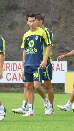 Jorge Larena